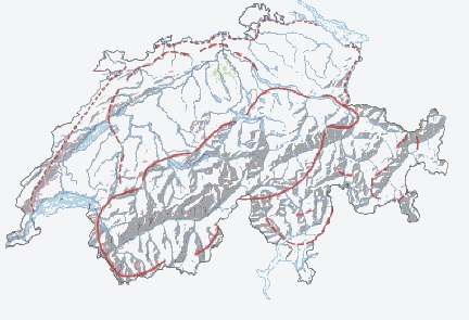 Reduitlinien in der Schweiz.